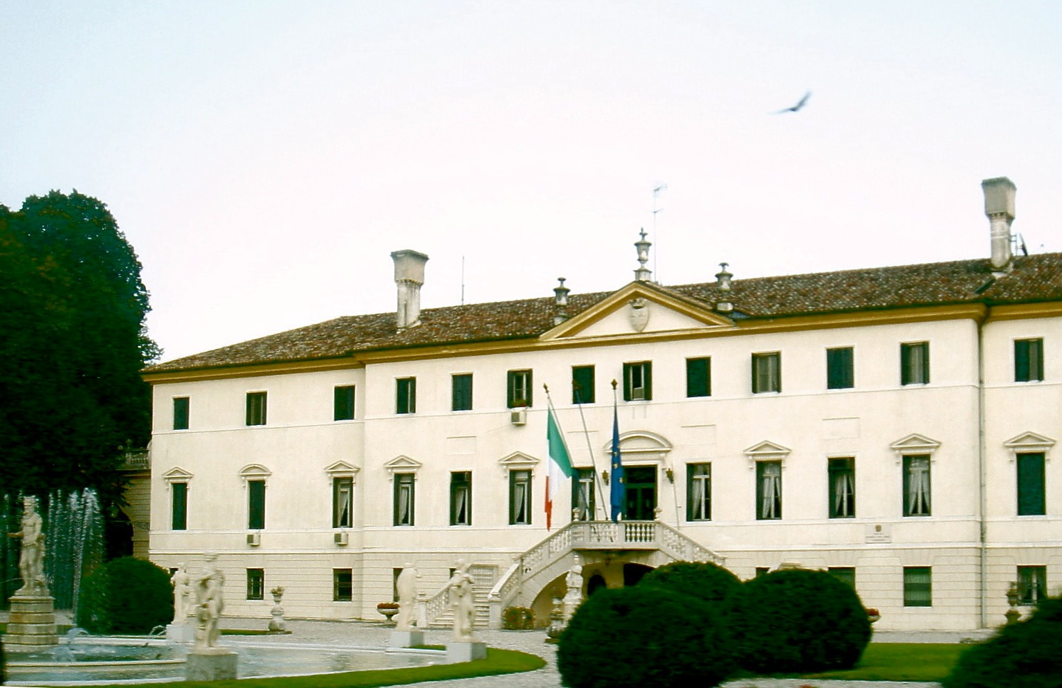 Treviso, località Sant'Artemio: Villa Manfrin detta Margherita (XVIII sec.), progetto di Gian Antonio Selva.